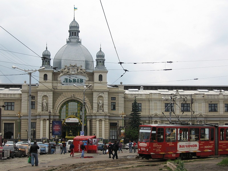 Lviv, vokzal i tramvaj (Lemmberg, Hauptbahnhof mit Strassenbahn)